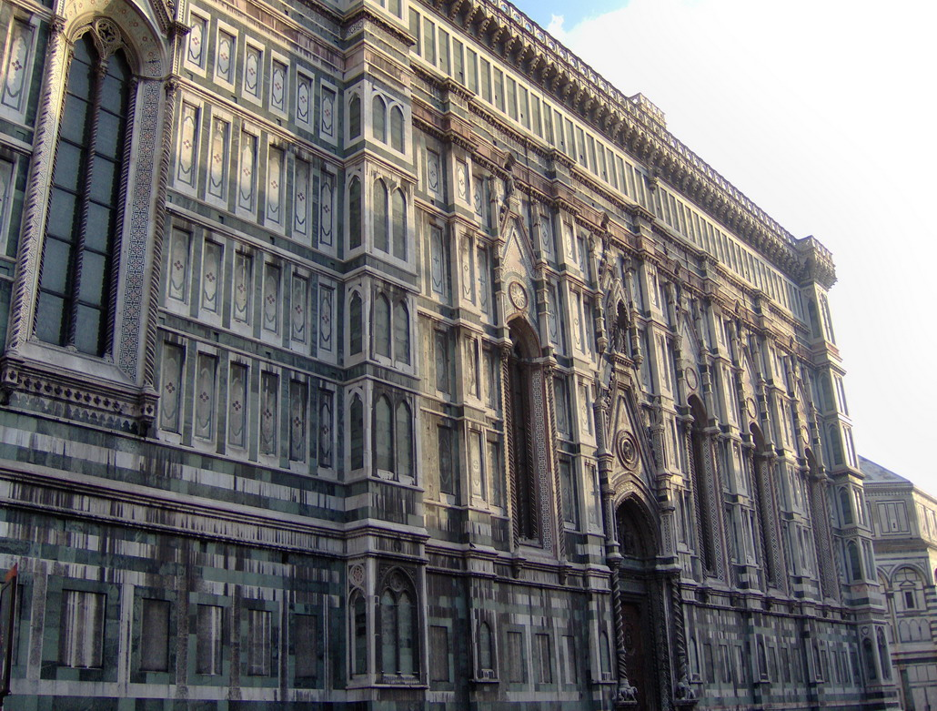 Firenze - Santa Maria del Fiore - left side